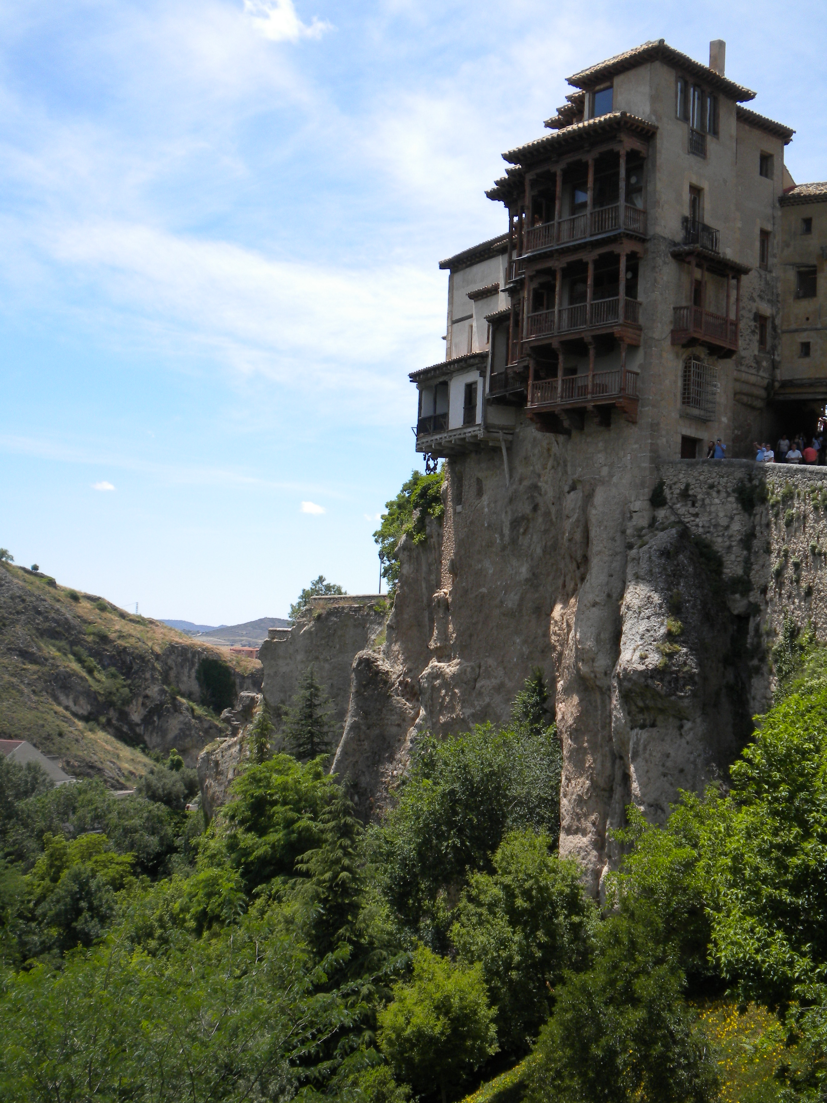 Hanging houses in Cuenca with a view of the bridge designed by The same Eiffel who designed the Tower in paris